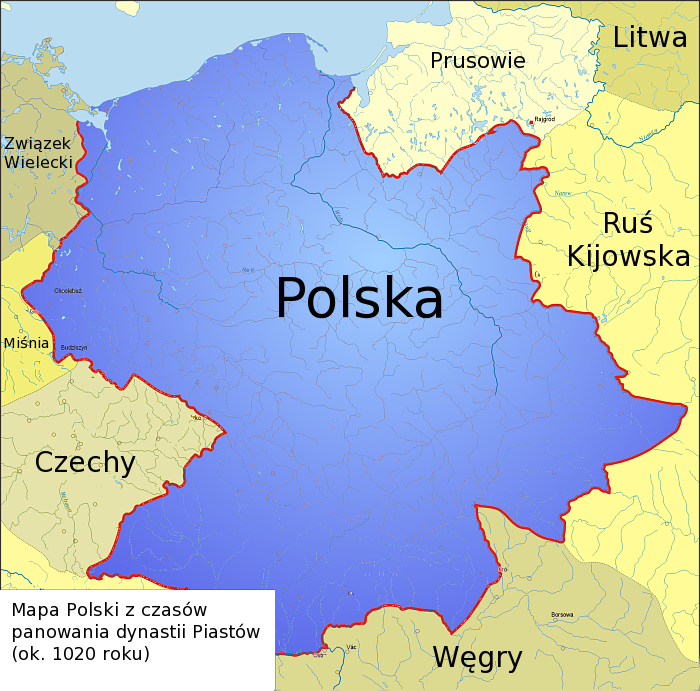 Polska w roku 1020